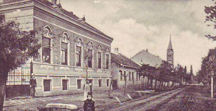 Ilustrată cu orașul Buziaș, începutul secolului al XX-lea.